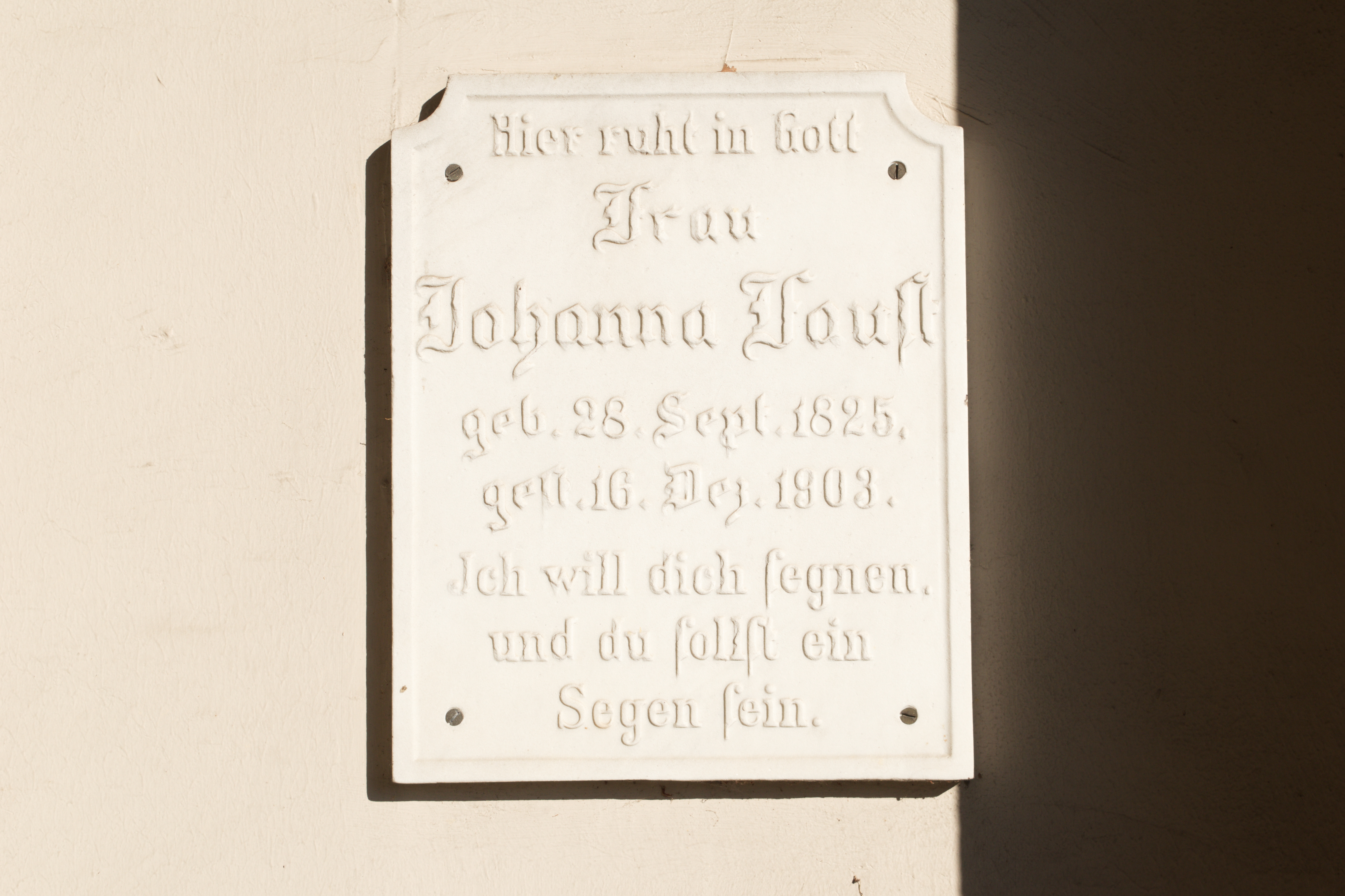 Hochstraße, Wuppertal